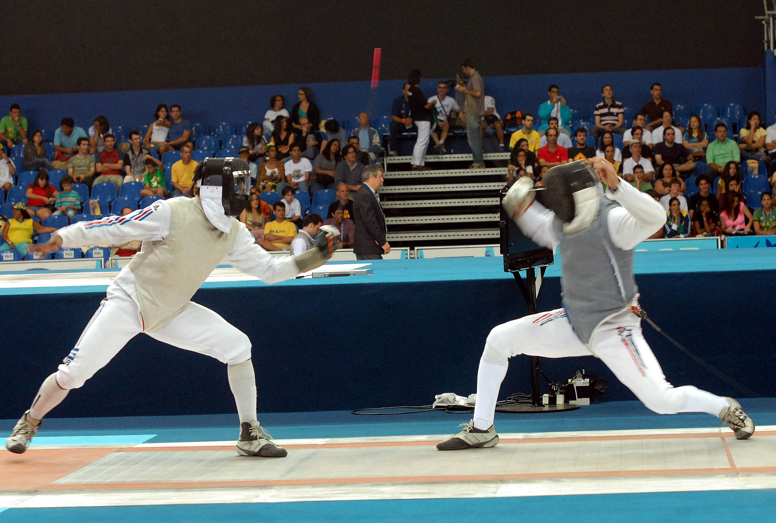 Competição de esgrima nos Jogos Pan-americanos, Rio de Janeiro.